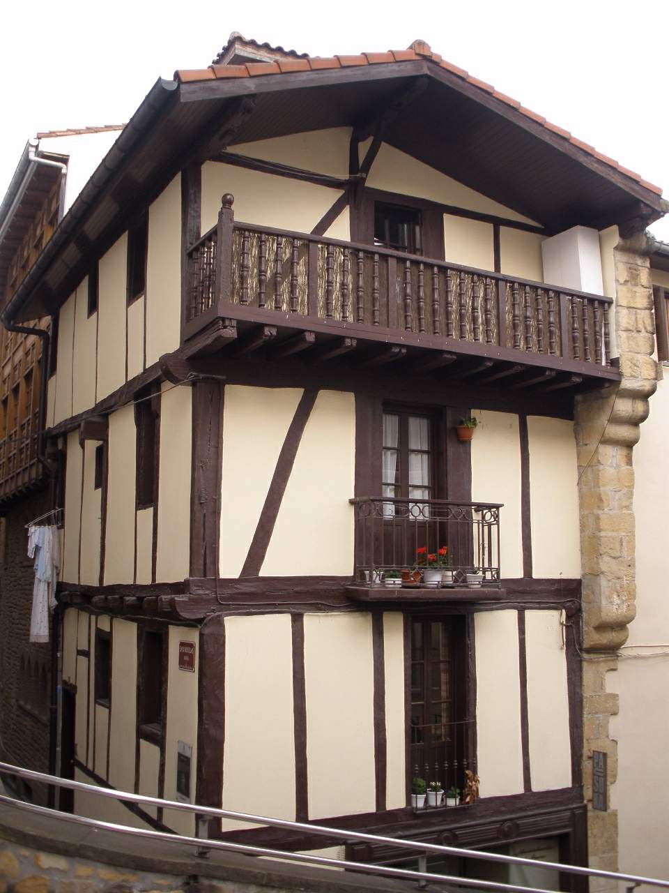 Orio (Gipuzkoa)